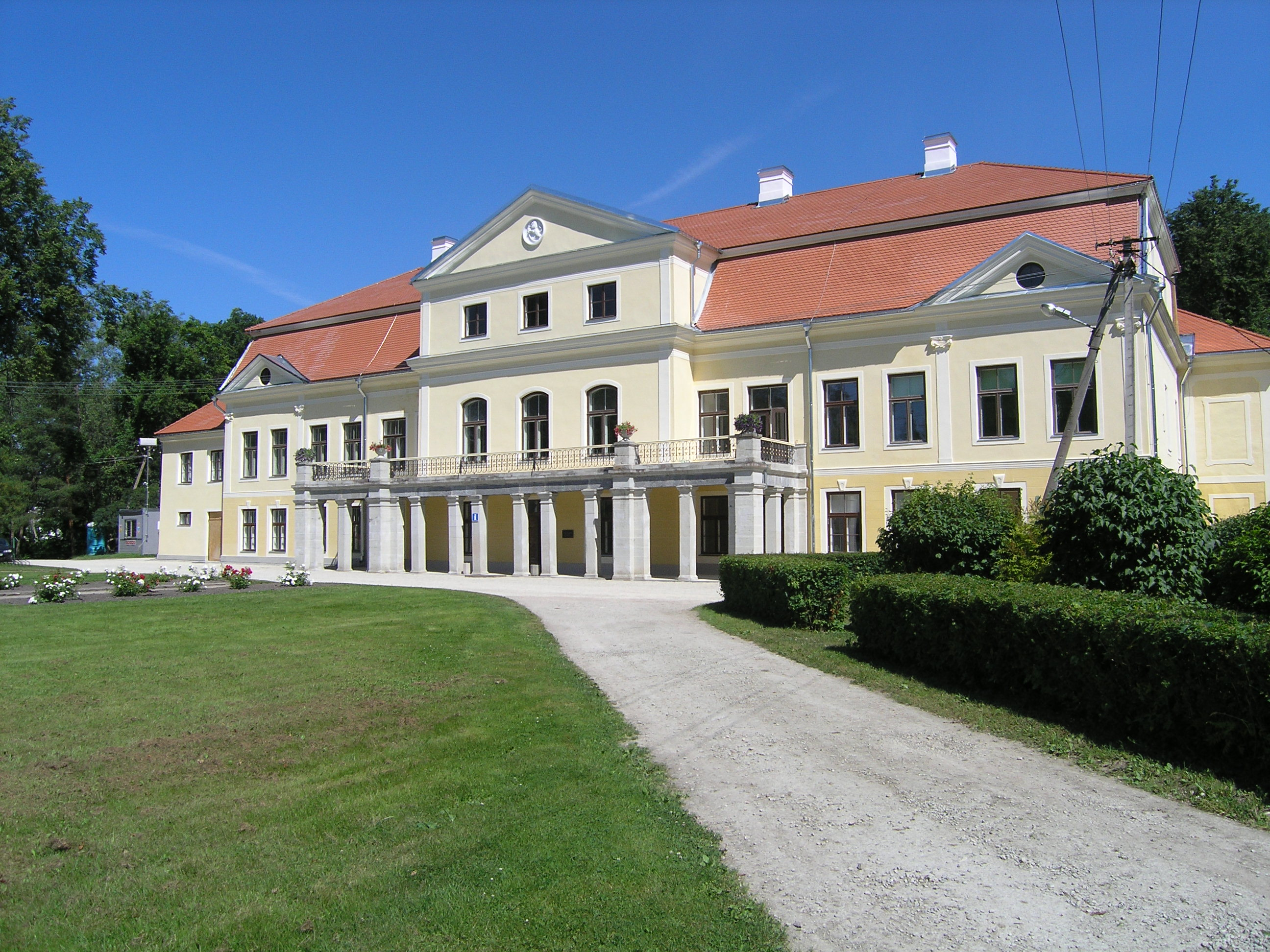 Vana-Vigala Põhikool eestpoolt